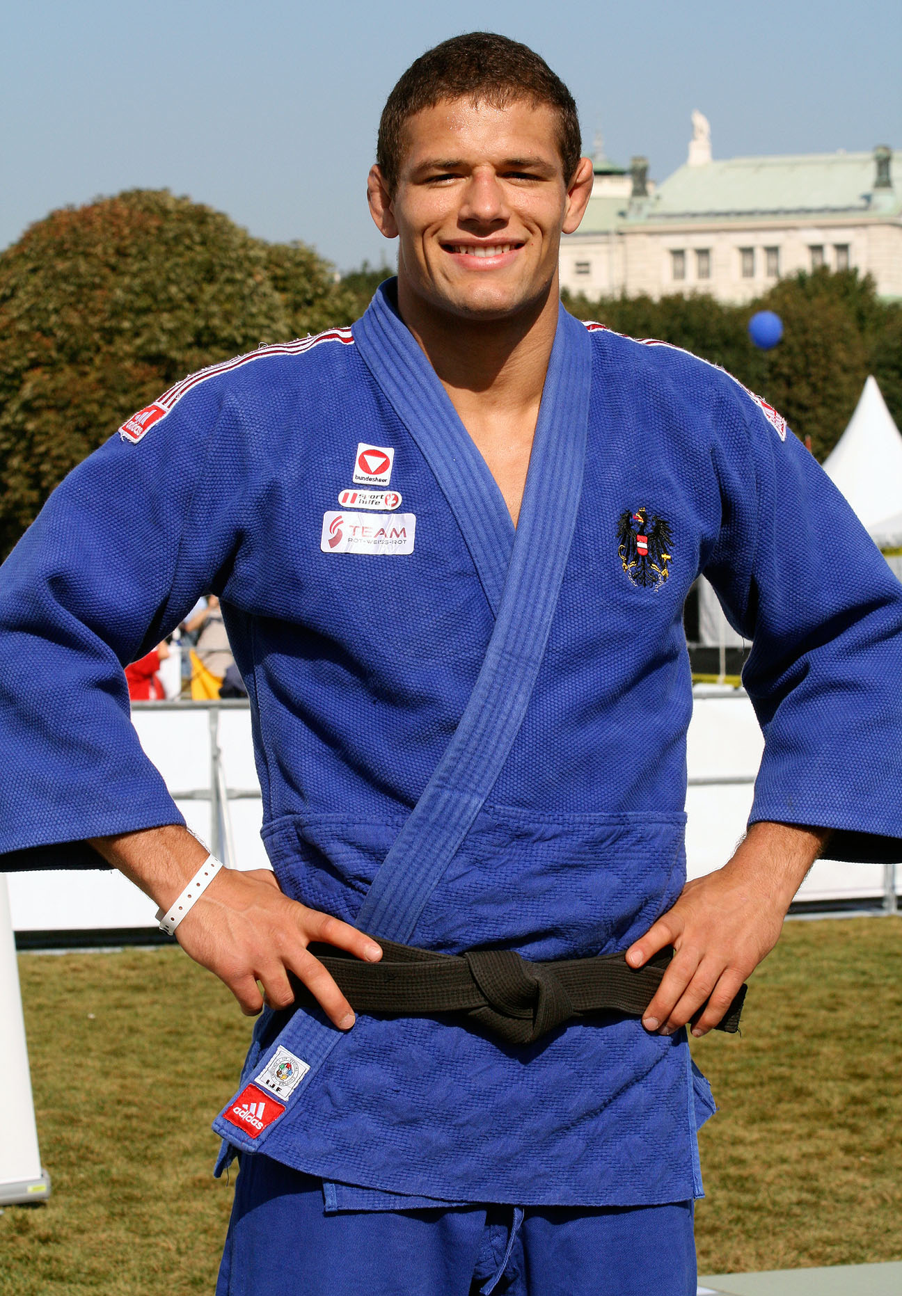 Max Schirnhofer am Tag des Sports 2009 auf dem Heldenplatz in Wien